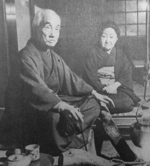 川合玉堂・とみ夫妻